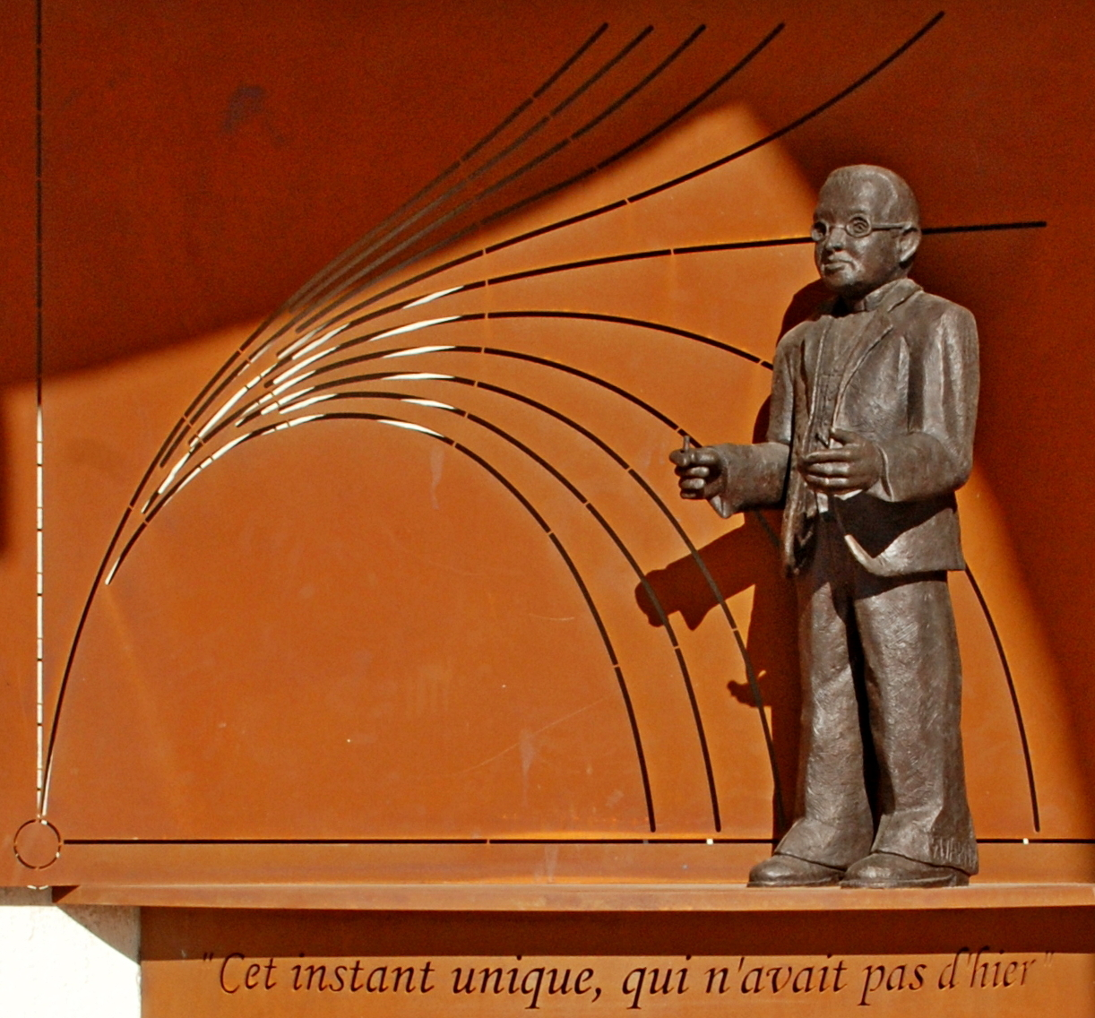 Belgique - Louvain-la-Neuve - Place des Sciences - Georges Lemaître - Gigi Warny